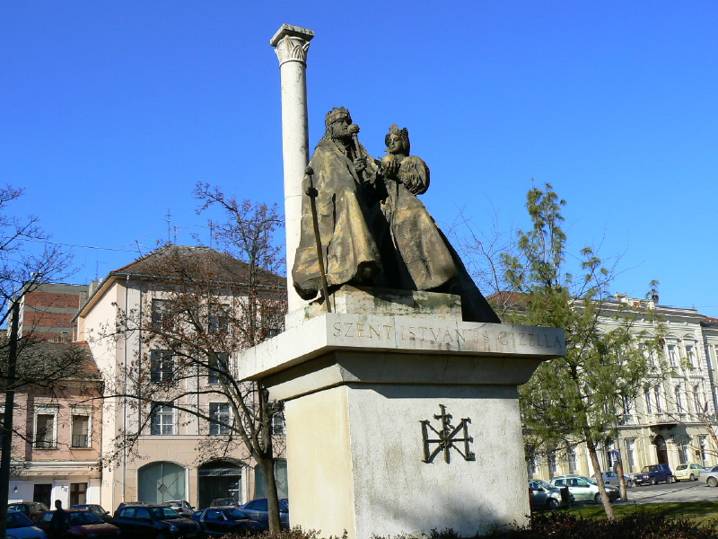 A honfoglalás 1100. évfordulója tiszteletére került Szeged főterére - a Széchenyi térre - a királyi pár. István az államalapító a szent koronával a fején, koronázási palásttal és jelvényekkel foglal helyet a trónuson. Mellette a fiatal királyné Gizella, kezében rózsafüzérrel. A talapzatra a közismert Stephanus rex monogram került